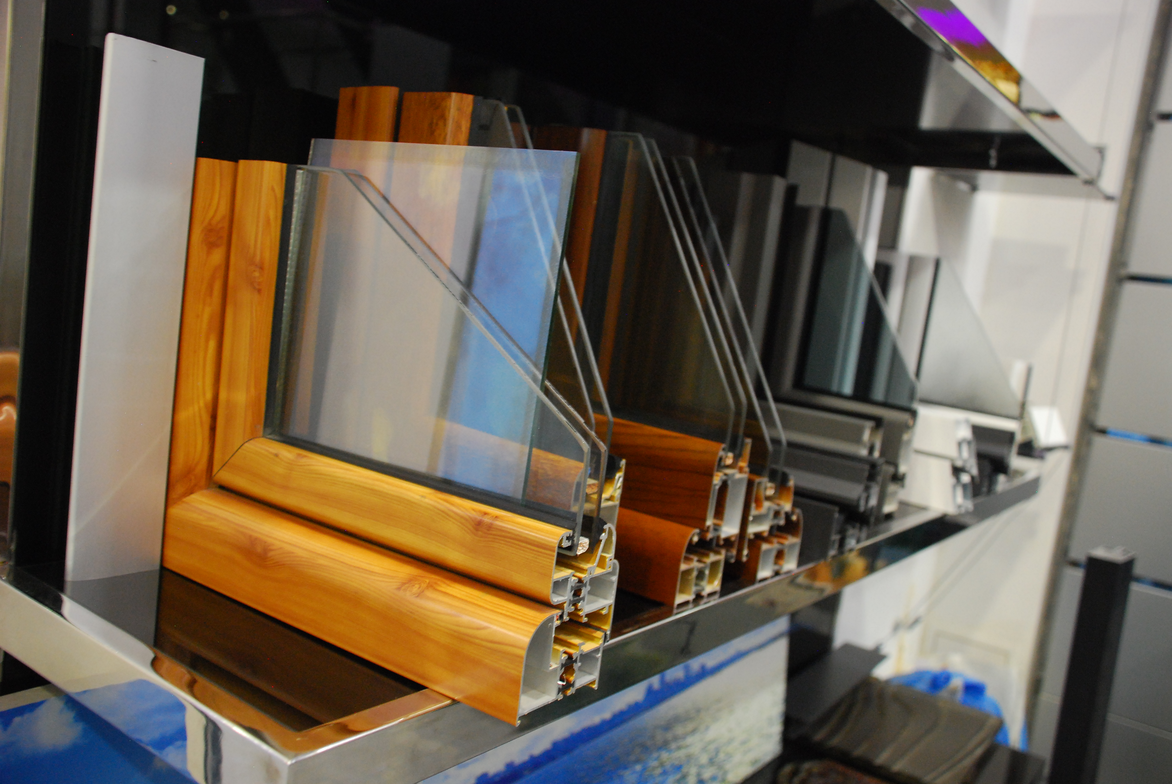 Ցուցադրված ապակեփաթեթներ